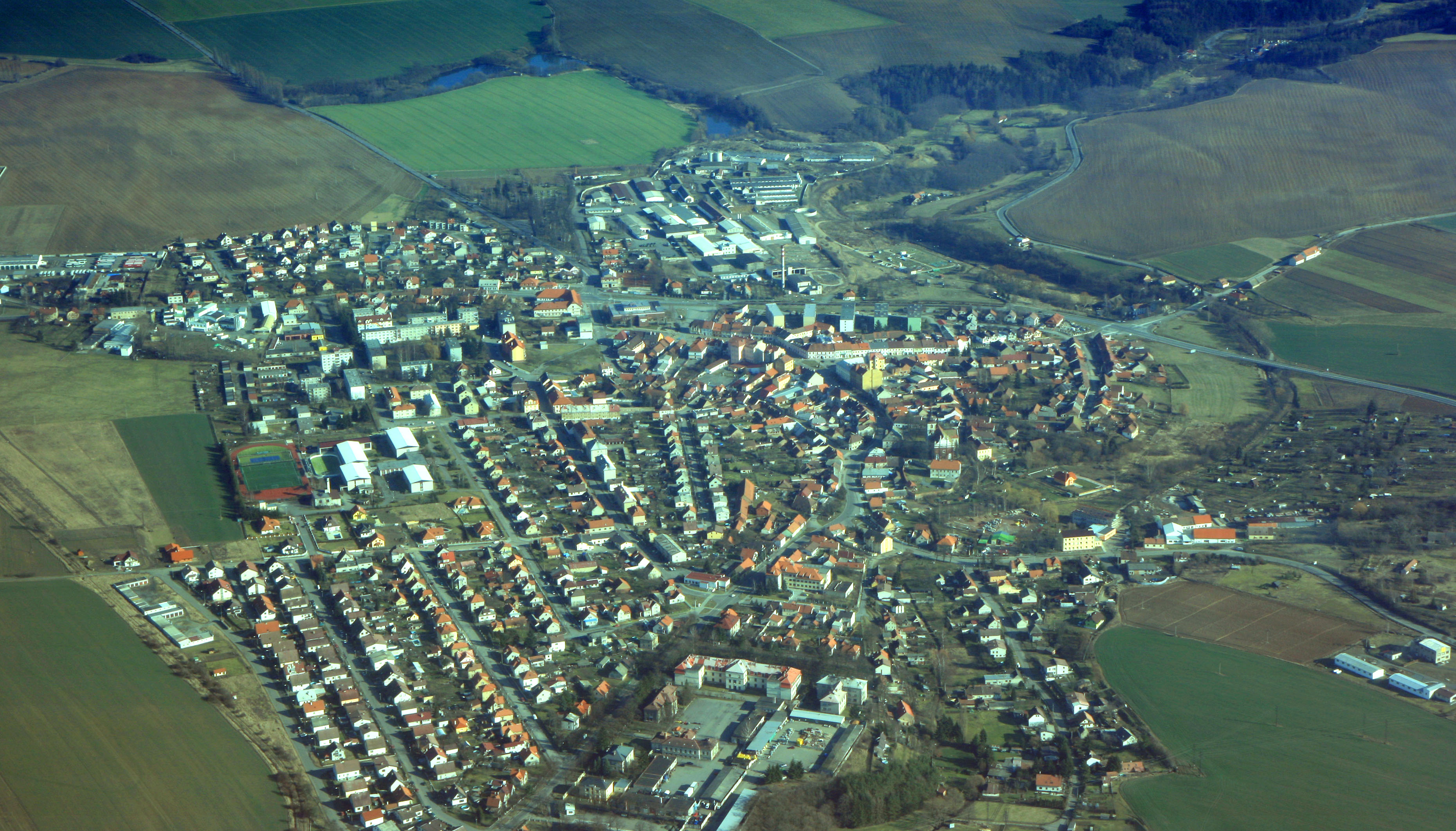 Město Kralovice od západu.